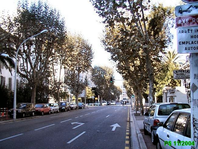 bd Carabacel vers le début SE. De la place Jean-Moulin vers le Bd Dubouchage. Vue NW.